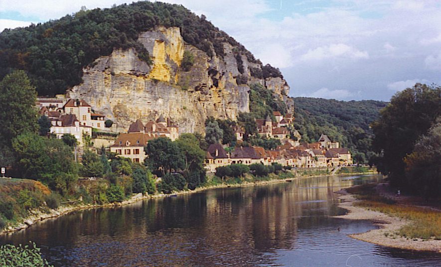 Dordogne River in La Roque-Gageac